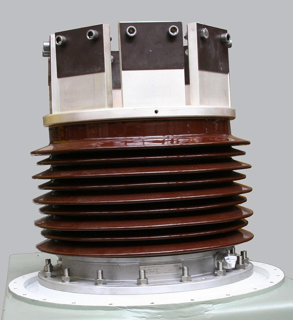 Hogestroom doorvoering RTXF 36-37,5 voor 37500Ampere